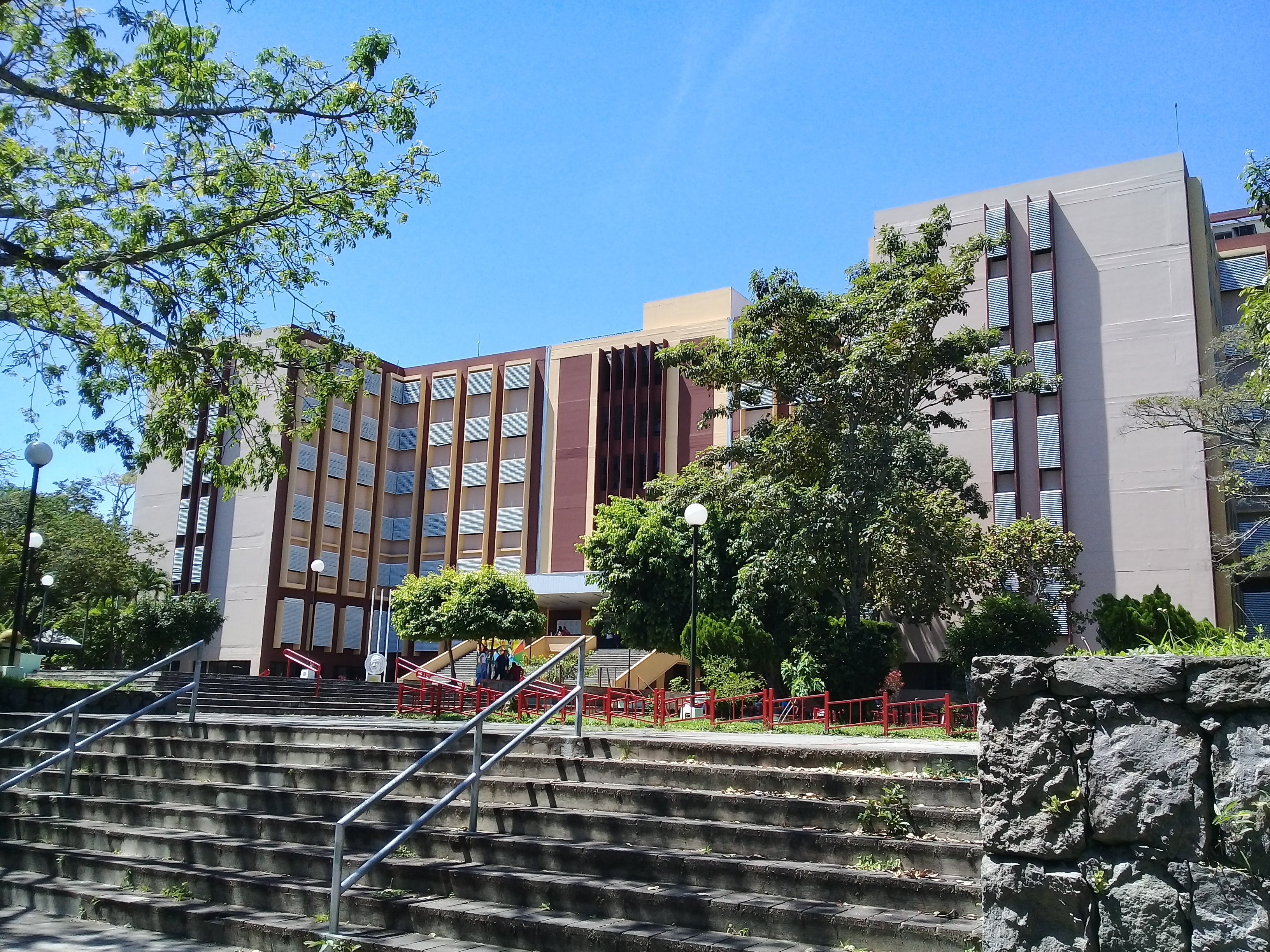 Edificio principal de la Facultad de Medicina de la Universidad de El Salvador.